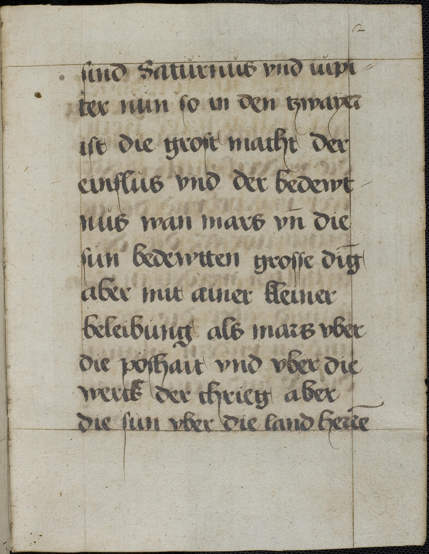 Codex Palatinus germanicus 13, Blatt 2r - Albumasar (Abū-Maʿšar Ǧaʿfar Ibn-Muḥammad): De significationibus planetarum (deutsch)